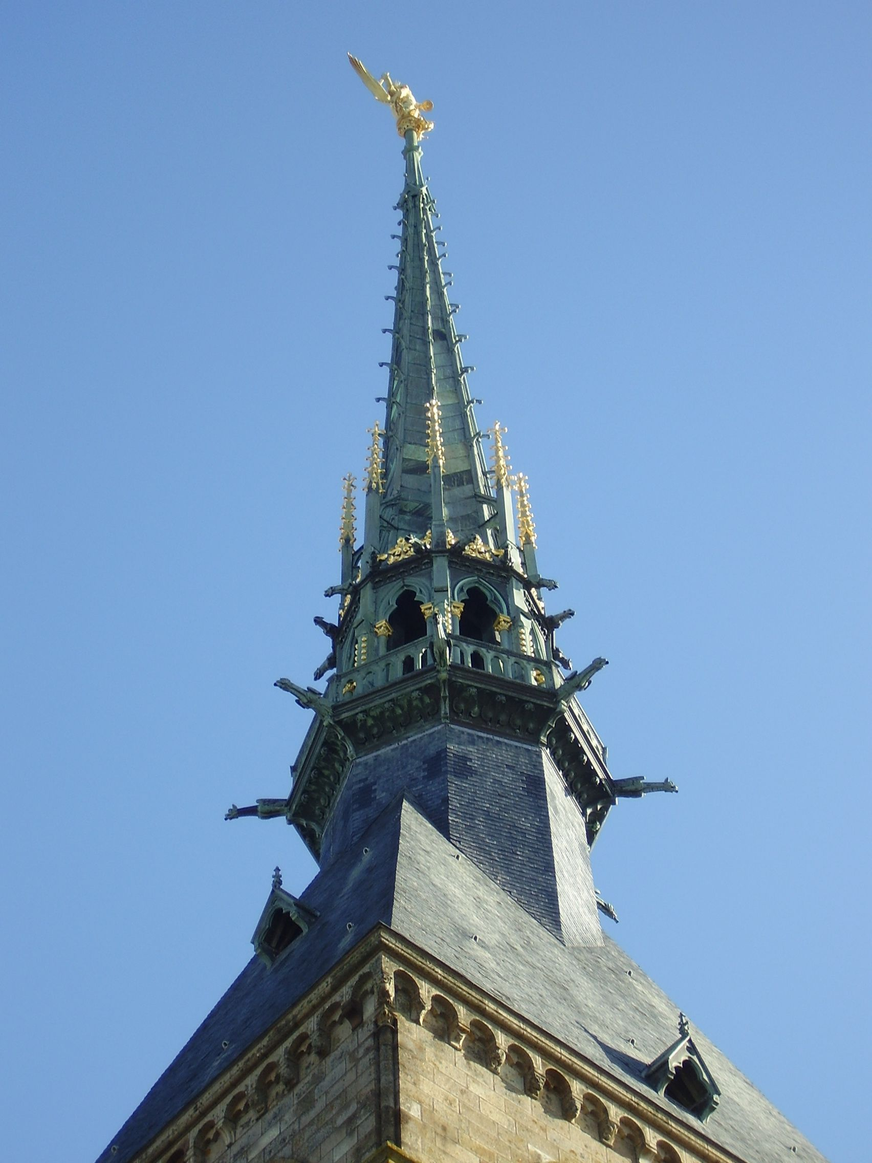 Mont Saint-Michel; Frankreich